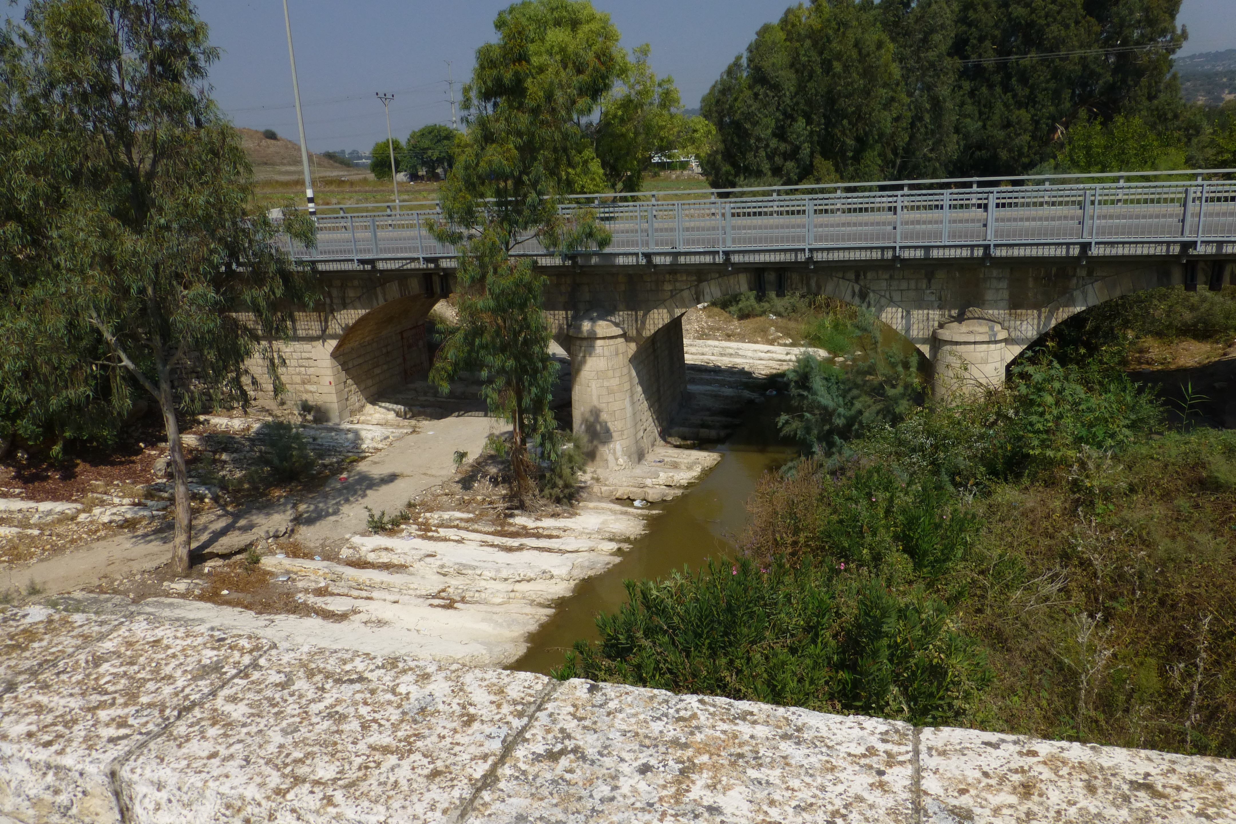 רכבת העמק - מעבירי מים והסוללה - צומת העמקים